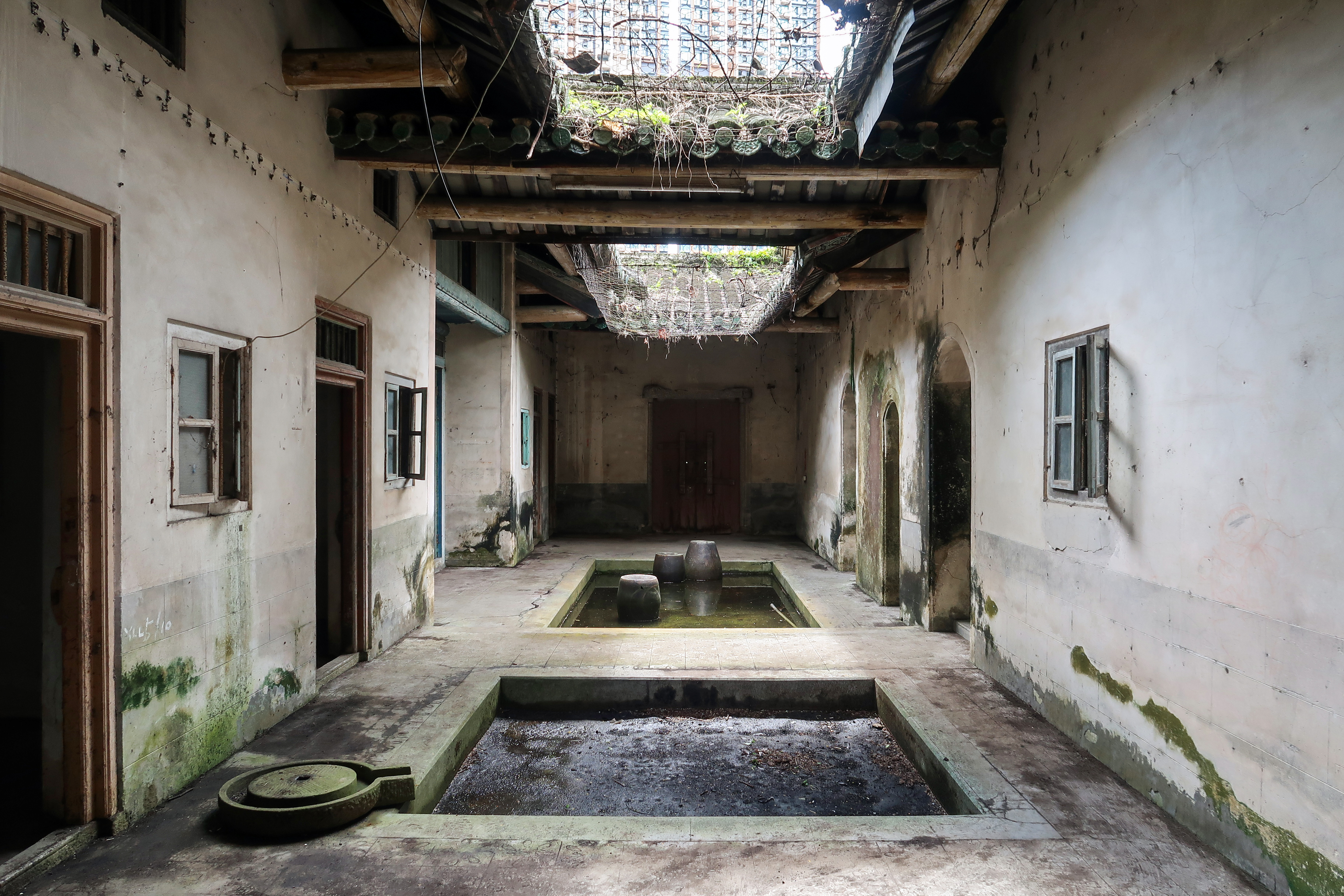 Pun Uk Mansion